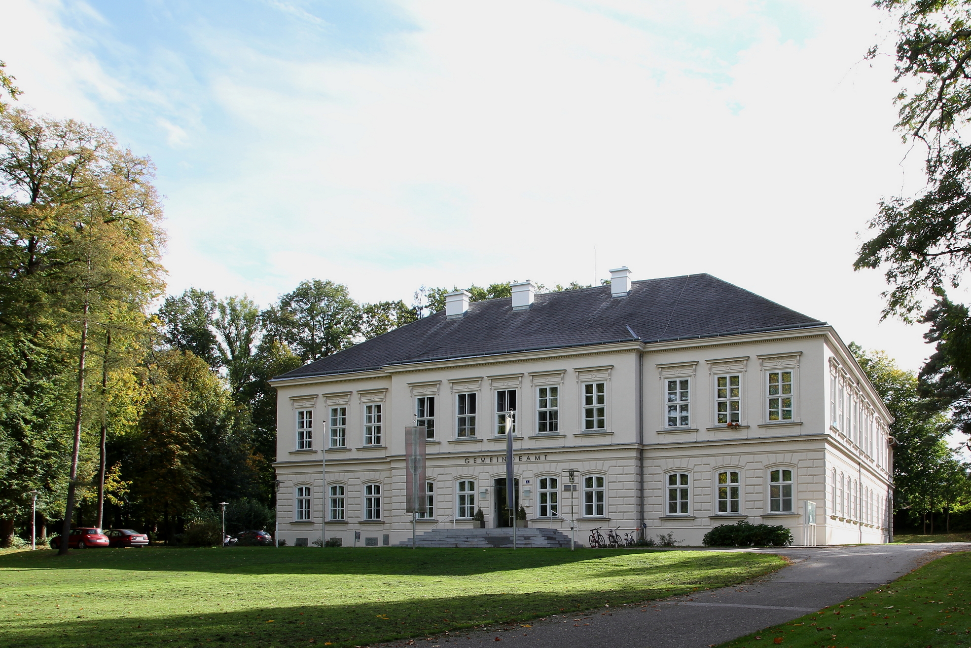 Schloss in der niederösterreichischen Marktgemeinde Würmla. Die dreiflügelige, zweigeschossige Anlage mit Kellergeschoss und einheitlicher historischer Fassade wurde an Stelle eines ehemaligen Wasserschlosses 1894 nach Plänen von Johann Julius Romano Ritter von Ringe errichtet.